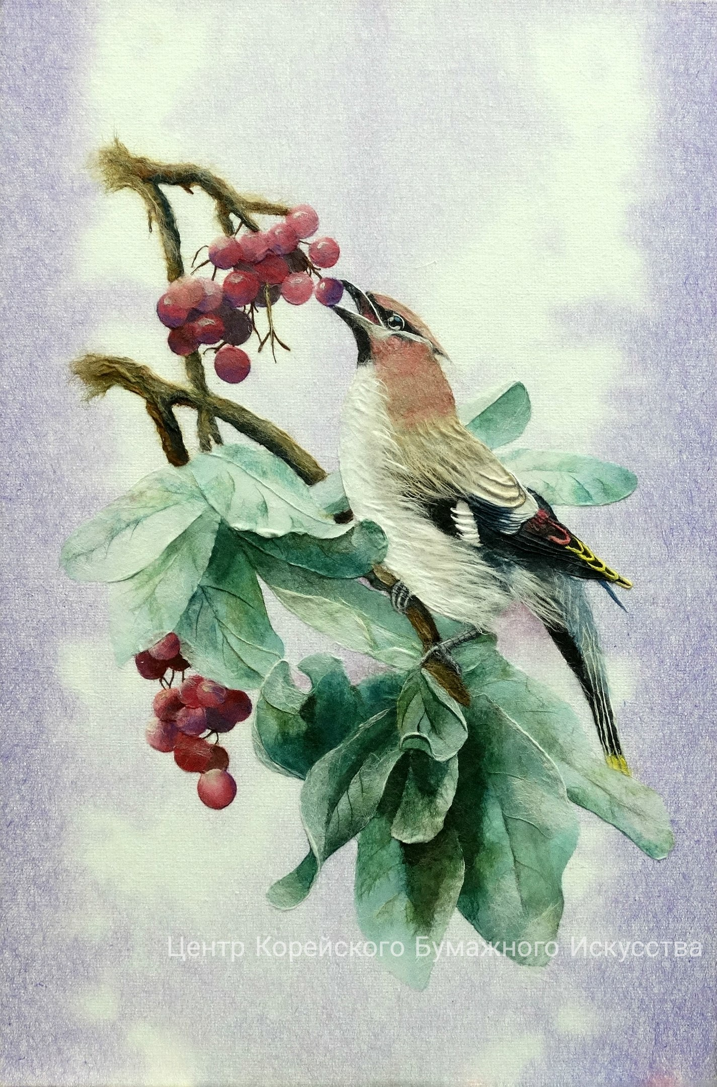 Картина в технике Хандигырим. Свиристель сидит на ветке дерева